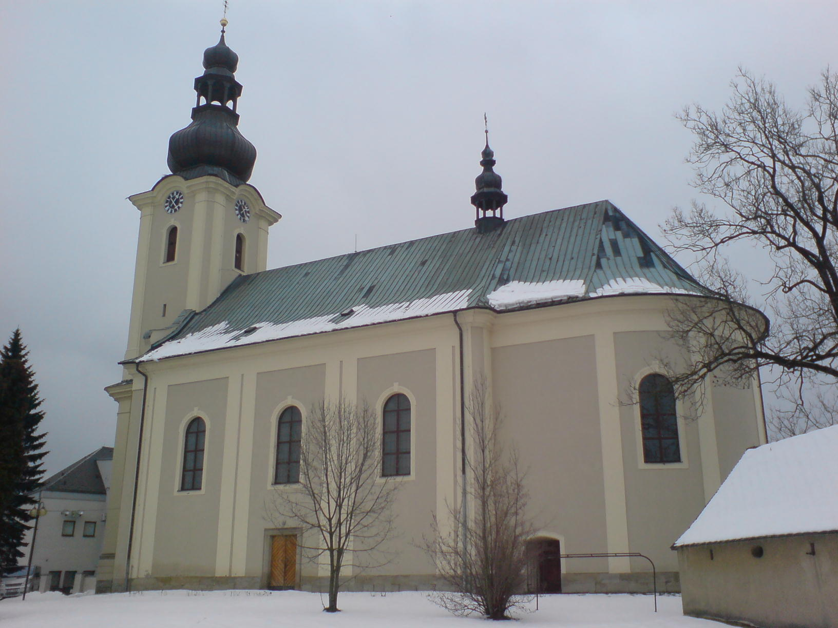 Kostel Všech svatých v Rožnově p. R.